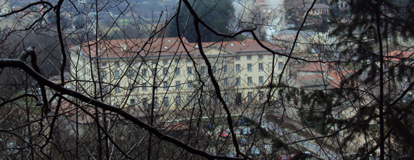 prise de vue de la façade Ouest de l'Ancienne Abbaye de la séauve sur semene